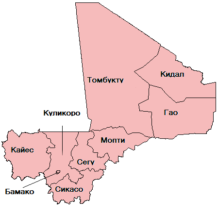 Карта на регионите в Мали на български